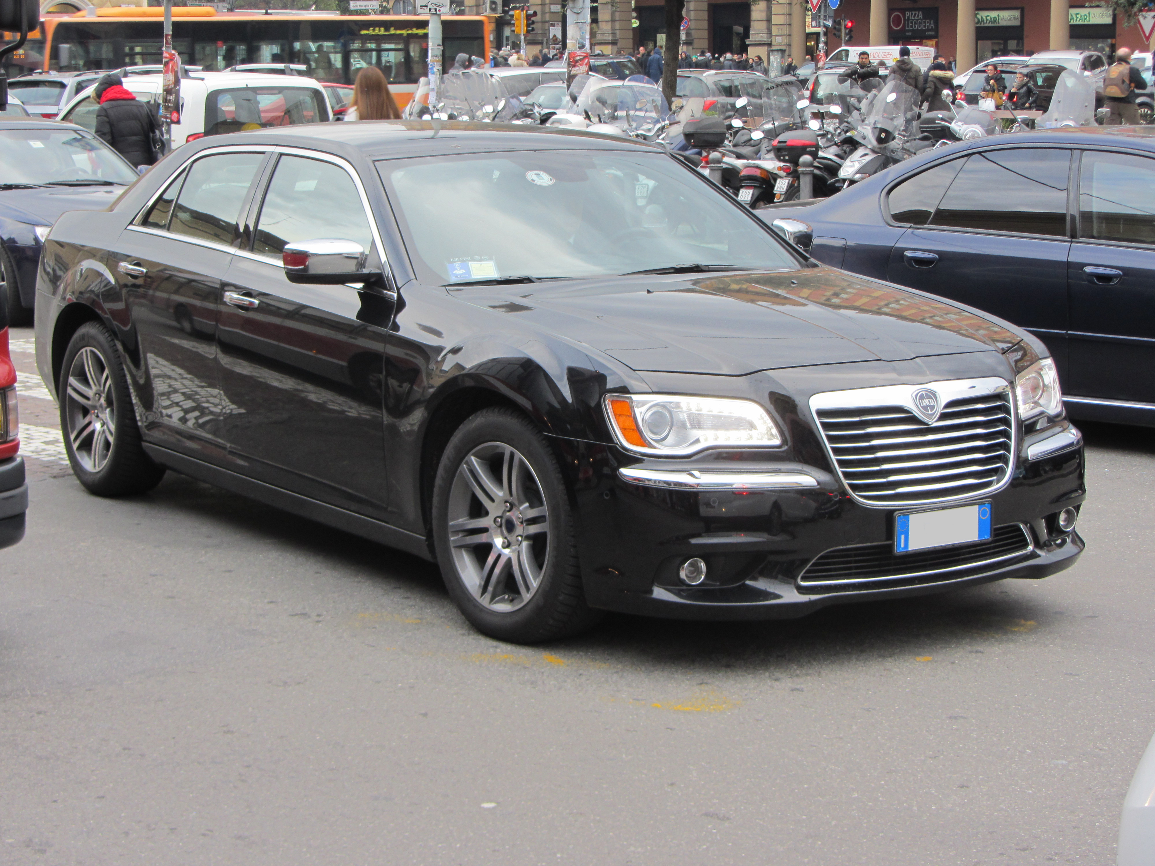 Una Lancia Thema 2011 a Bologna